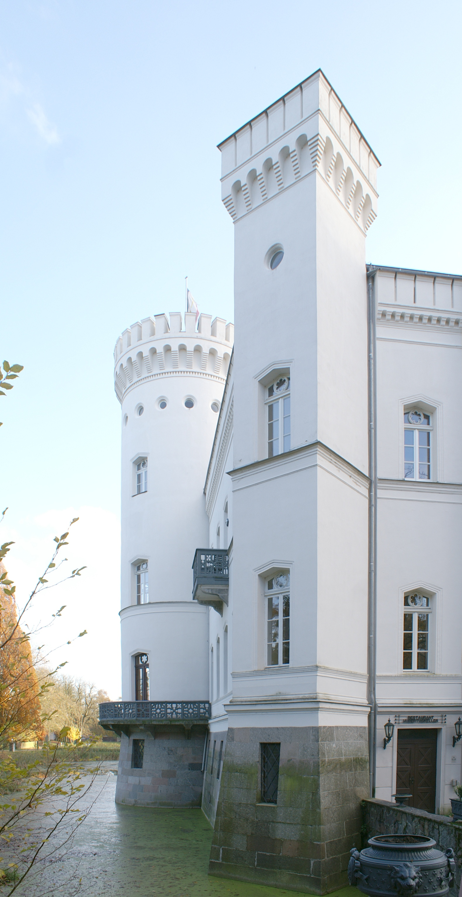 Schloss Schlemmin - Parkseite - Nord